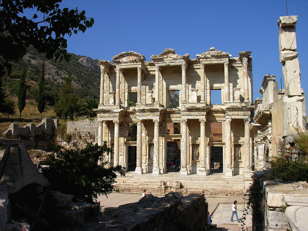 Turkey-2812